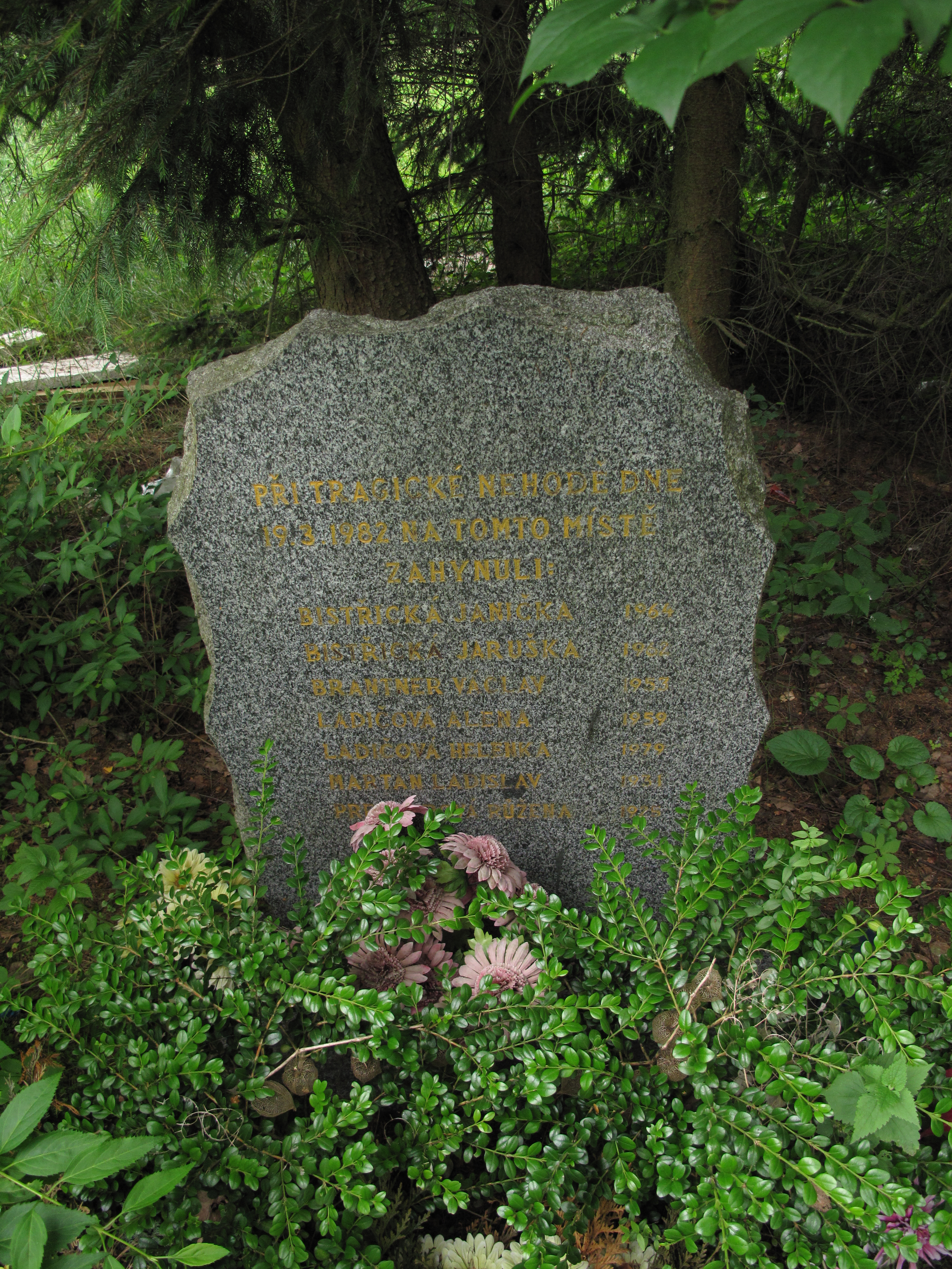 Pomník se jmény objetí nehody autobusu a vojenské cisterny u Svojkovic v roce 1982. Okres Rokycany, Česká republika.